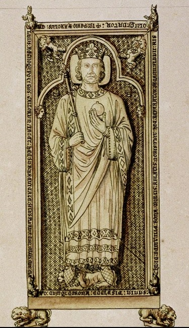 Charles the Bald